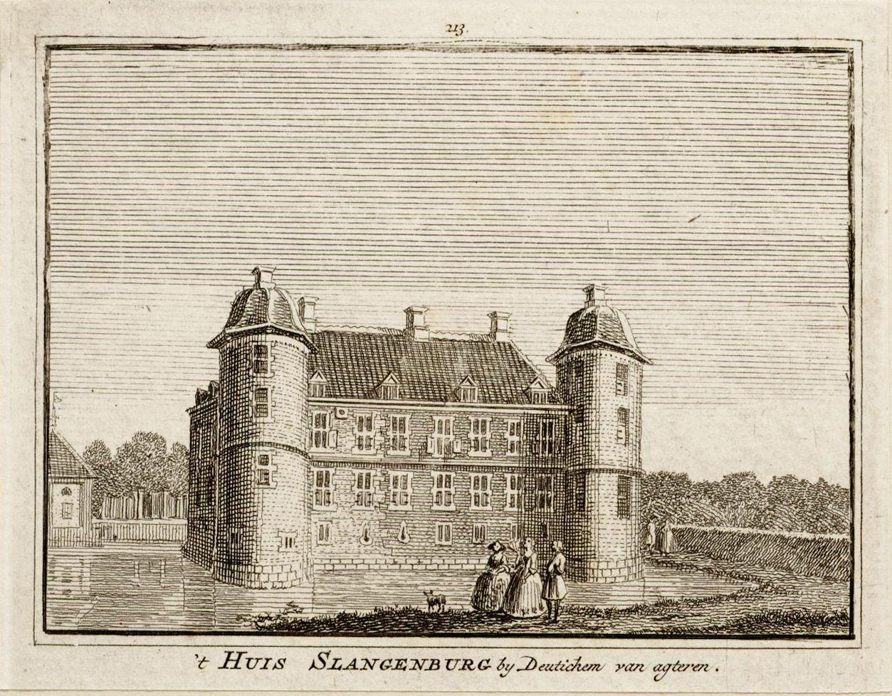 Slangenburg